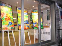 Évasion Lyrique oil on canvas painting, 2004, Huile sur toile, Maryse Casol, Modern Art, Fauvism